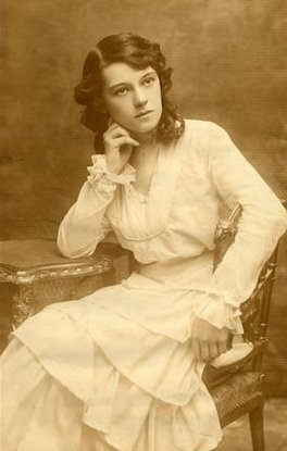 Gábor Andor: Palika; Társulat: Nemzeti Színház, Budapest; Bemutató: 1915.10.16; Rendező: Csathó Kálmán; Szereplők: Riza: Bajor Gizi.